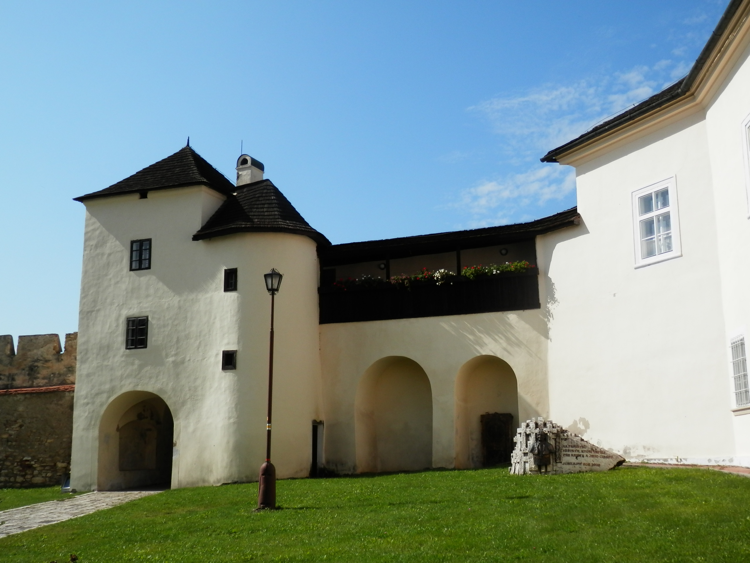 Mestské hradby. Renesančná, Horná (západná) brána opevnenia. Doba vzniku 2.polovica 14.storočia. Spišská Kapitula-Spišské Podhradie.